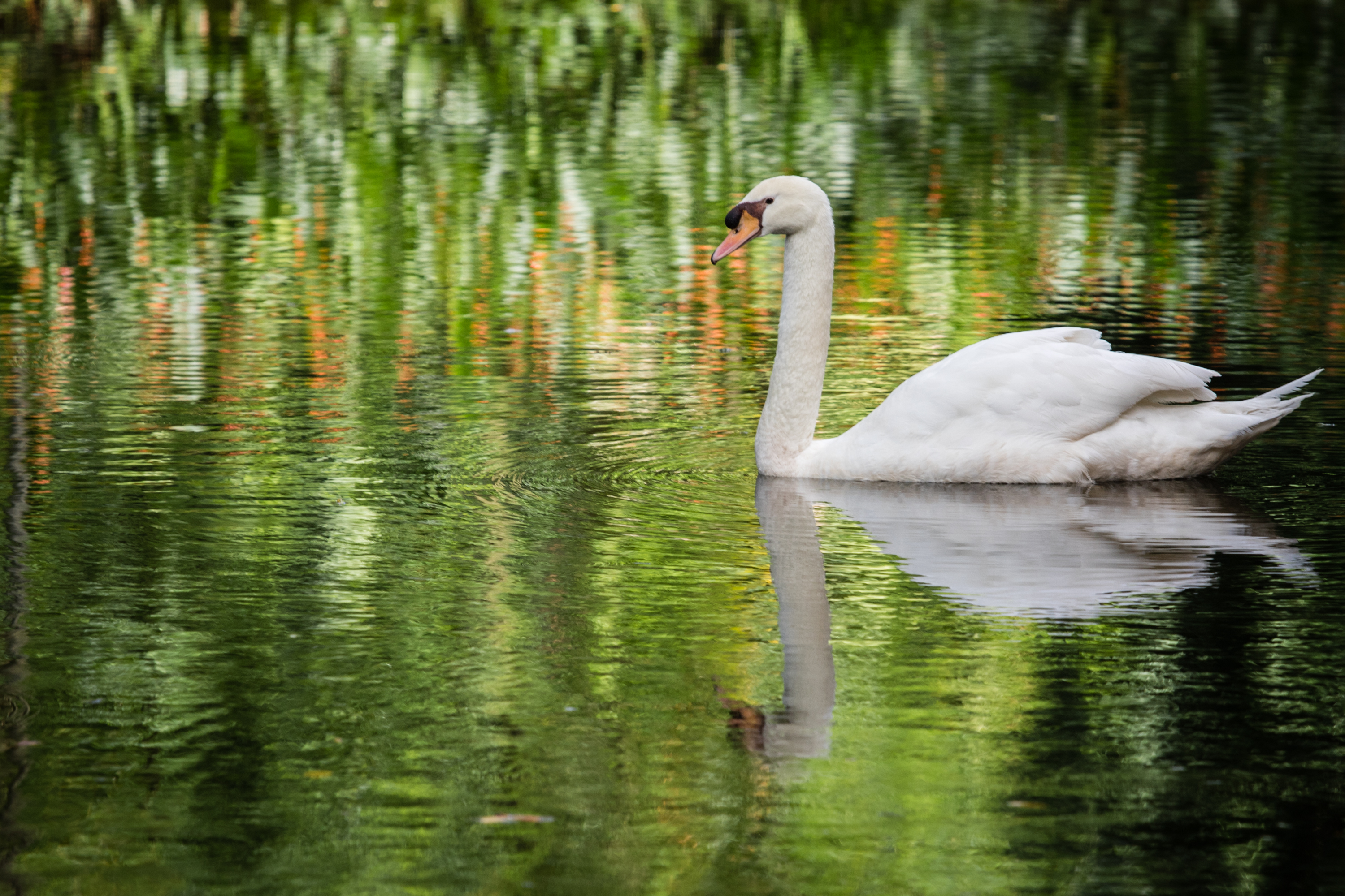 Swan Lake, Jurong Bird Park, Singapore